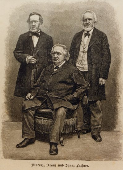 Brothers, composers and conductors: Vinzenz Lachner (1811-1893) Franz Lachner (1803-1890) Ignaz Lachner (1807-1895)